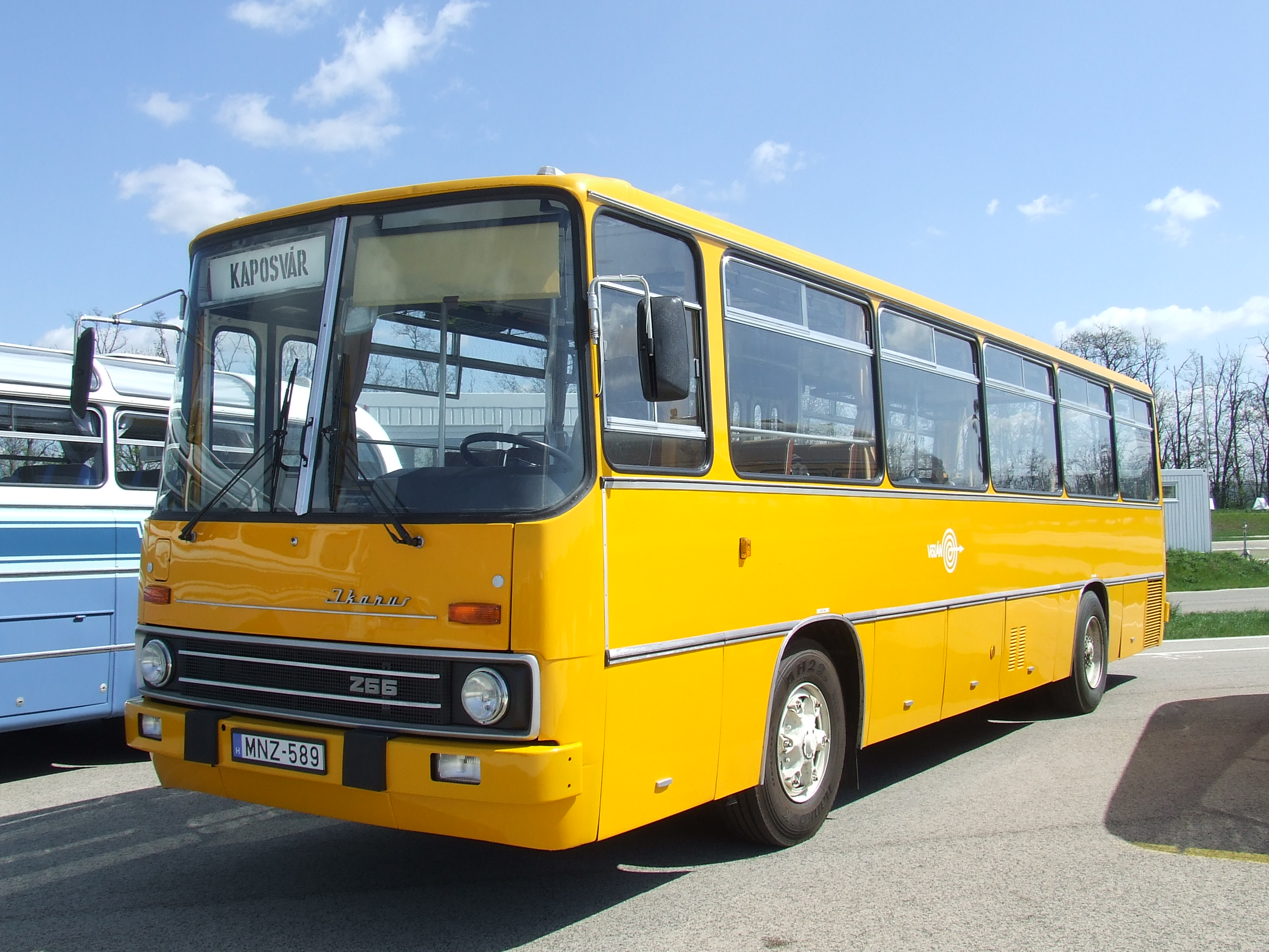 Busexpo 2016, Zsámbék